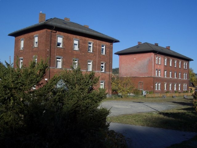 Am Bahnhof in Marxgruen gab es Eisenbahnerwohnhäuser. Das Bild zeigt die beiden Mehrfamilienhäuser im Oktober 2005.